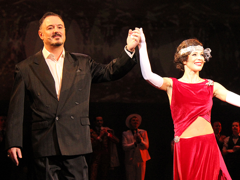 Артисты мюзикла «Пола Негри»: Максим Леонидов (Эрнст Любич) и Ирина Медведева (Пола Негри). Москва, ЦАТРА.